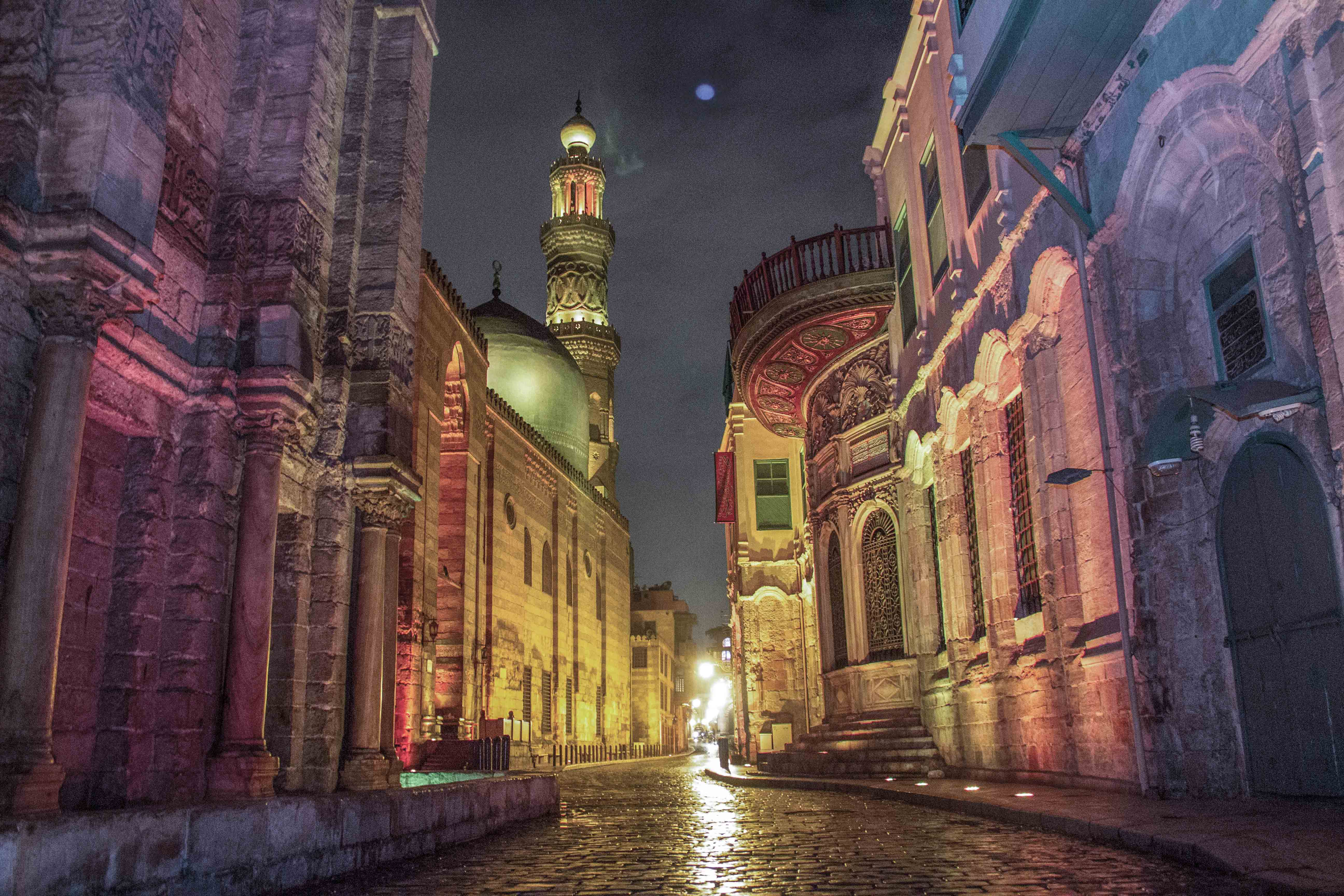 شارع المعز بعد الامطار